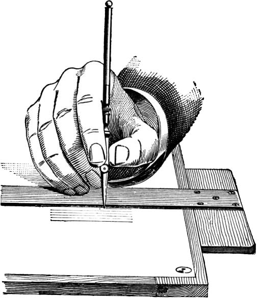 Nuova versione